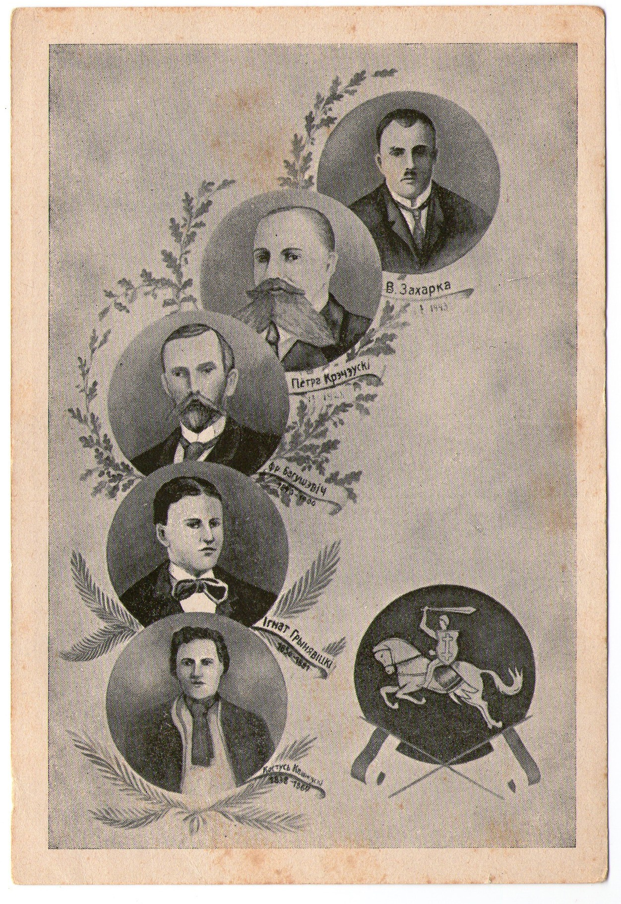 Беларуская (тарашкевіца): Паштоўка “Вялікія дзеячы беларускага Адраджэньня” з маляванымі партрэтамі Кастуся Каліноўскага, Ігната Грынявіцкага, Францішка Багушэвіча, Пётры Крэчэўскага й Васіля Захаркі. Аўтар Мікола Сільвановіч. Нямеччына, 1948.